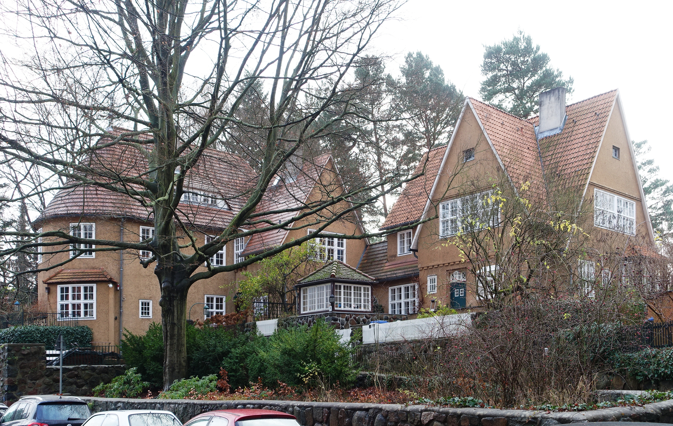 Siedlung